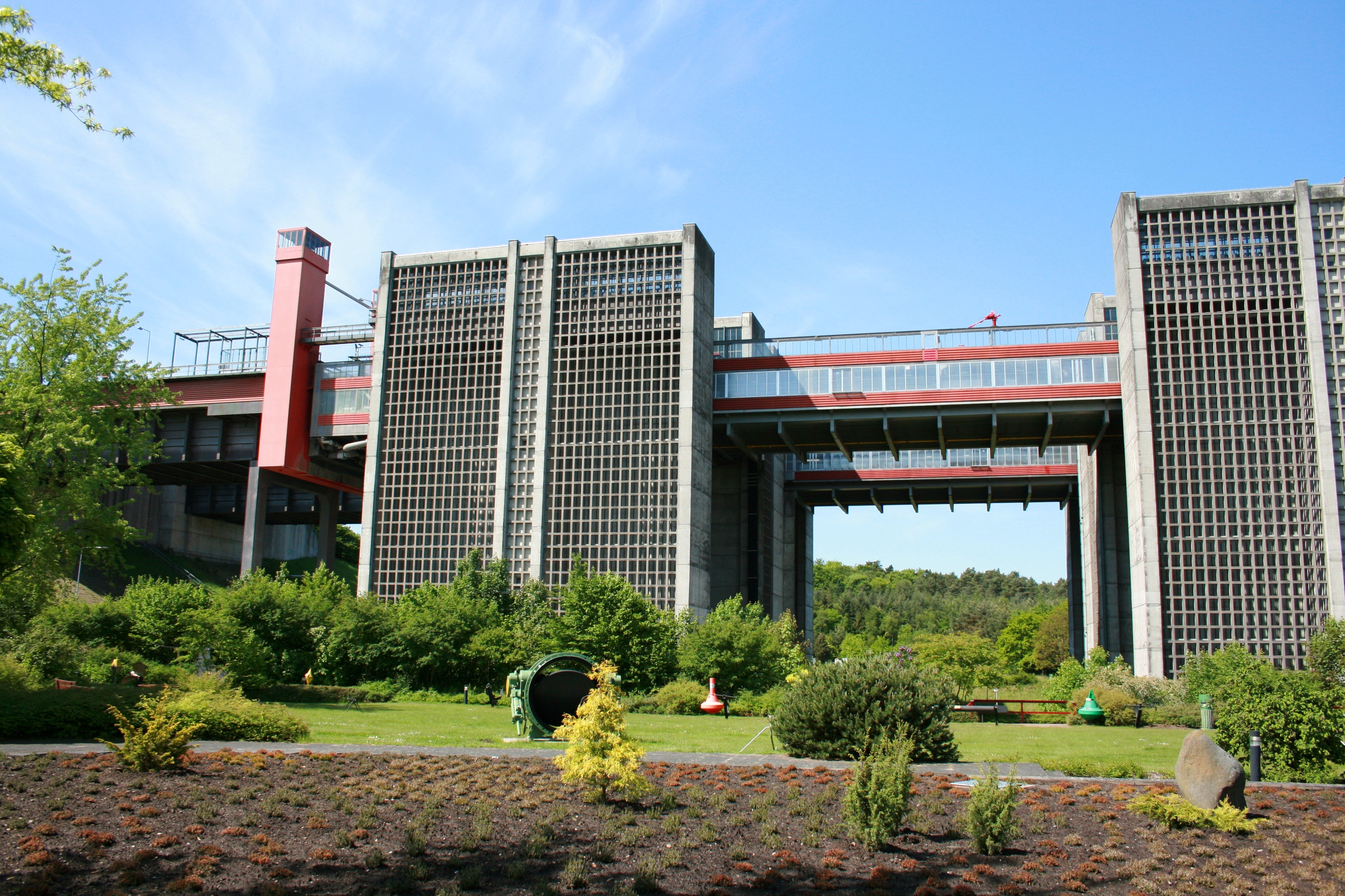 Park am Schiffshebewerk Scharnebeck